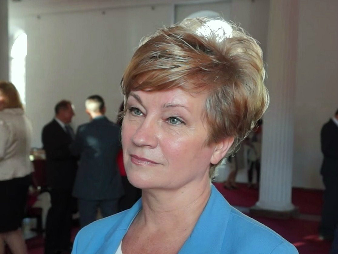 Marzenna Drab, polityk i urzędniczka.